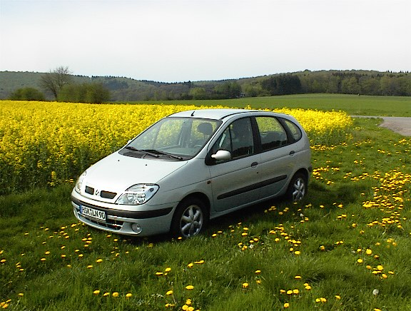 Renault Scenic 1.9dci RXE Baujahr 2001 Gekauft mit 4 km Verkauft mit 149.900km nach 6 Jahren